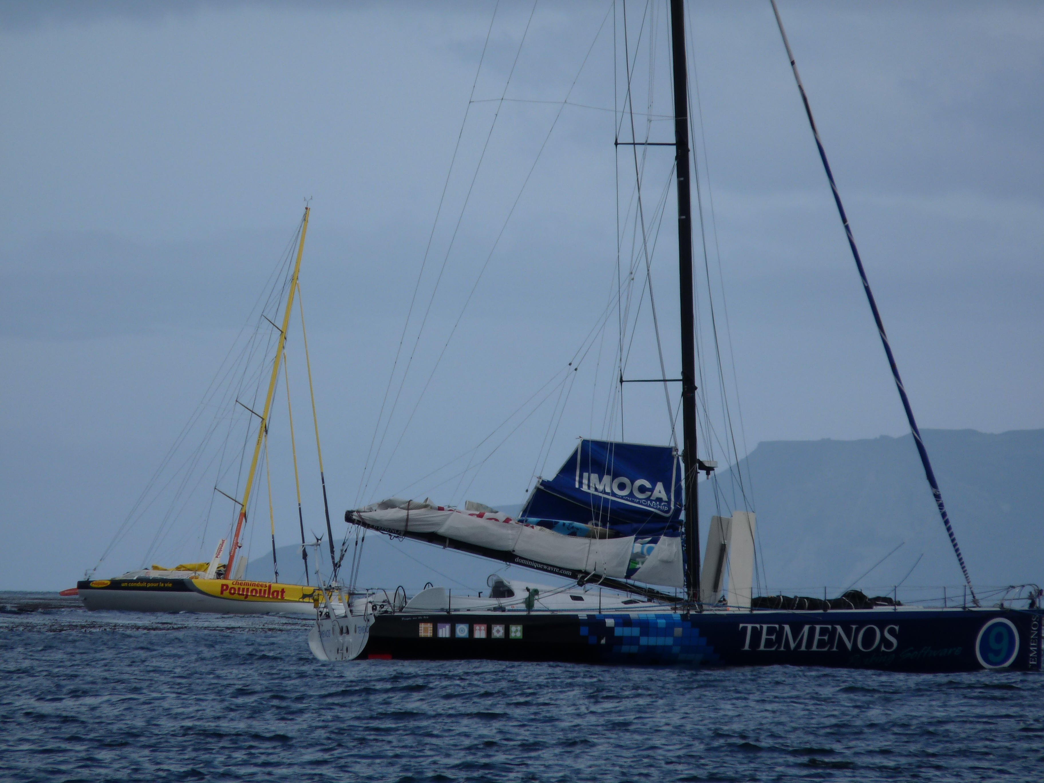 Temenos et Cheminées Poujoulat, deux voiliers courant le Vendée Globe 2008-2009 en escale technique pour réparation devant la base de Port-aux-Français, aux Kerguelen.